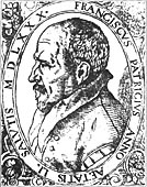 da wikipedia all'indirizzo [1]